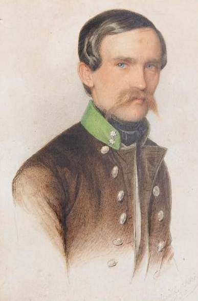 Honvéd portréja, (jelezve jobbra lent), 1850. Akvarell, papír. 135 x 90 mm. Sikó Miklós (1818-1900) festménye.